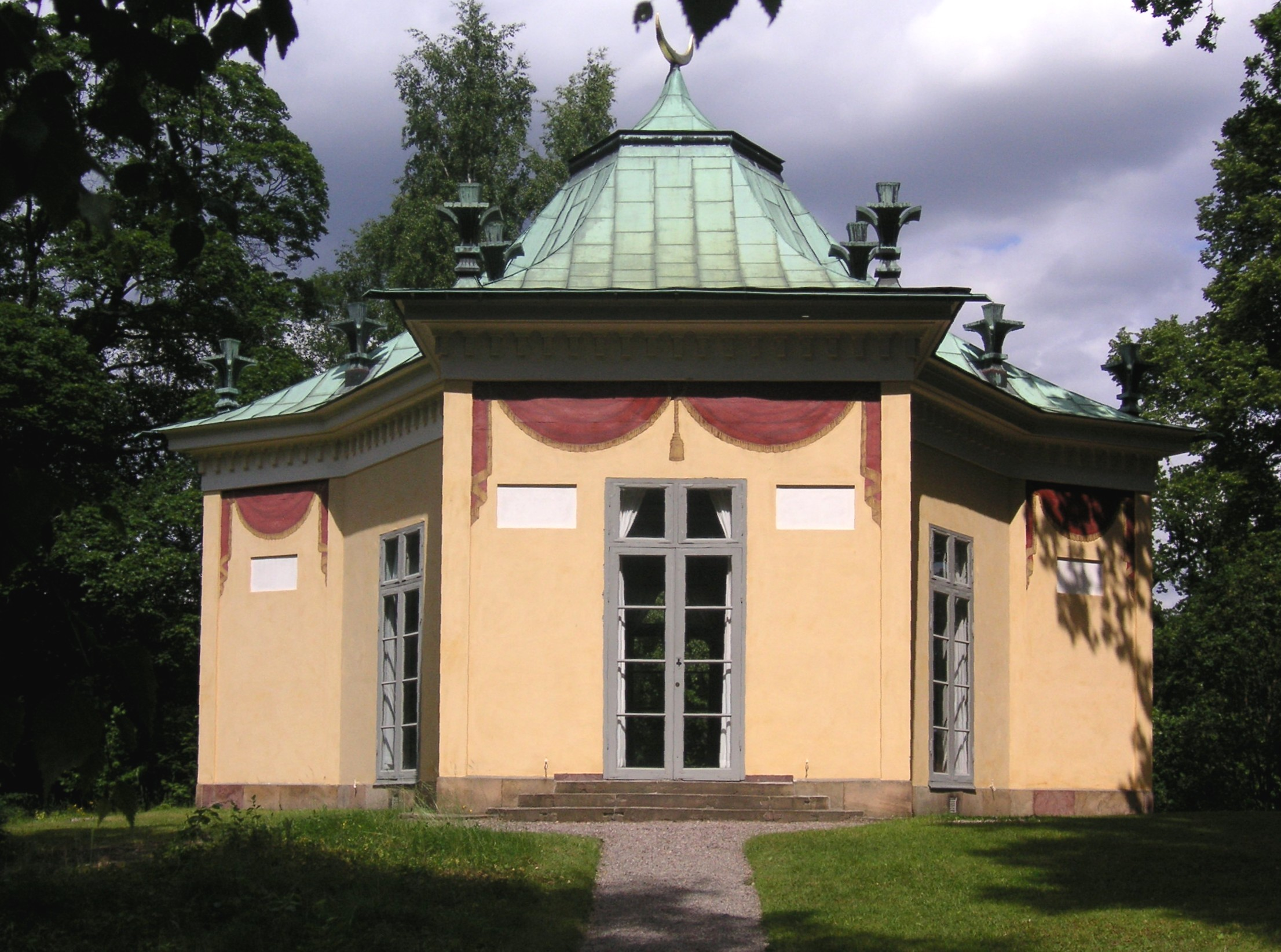 Turkiska kiosken i Hagaparken